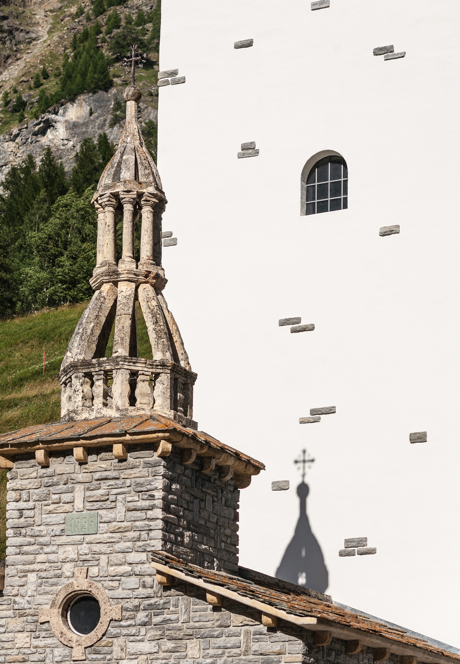 Rippenhelm des ehemaligen Kirchturms, Saas Grund, Kanton Wallis, Schweiz.